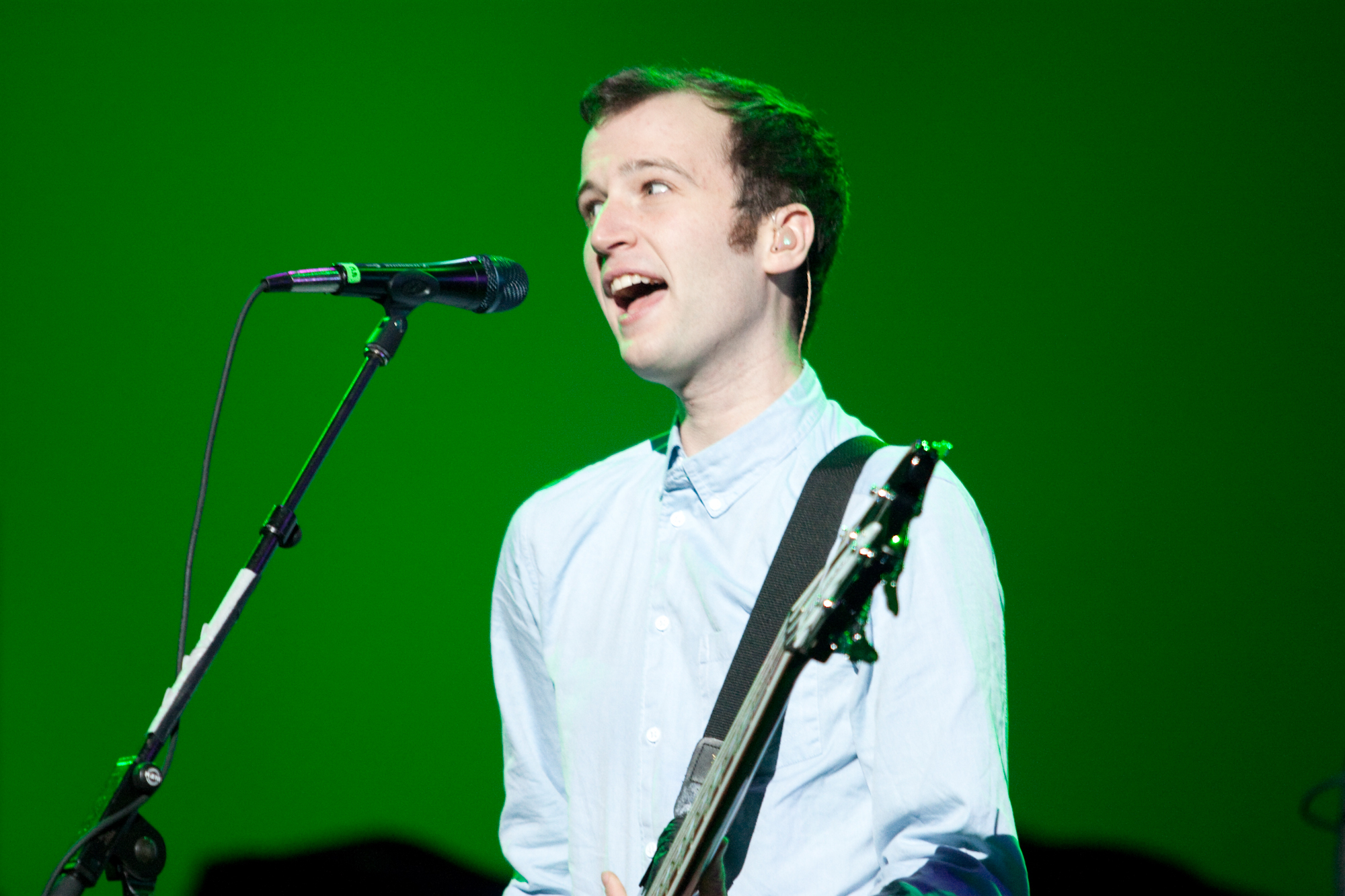 Vampire Weekend